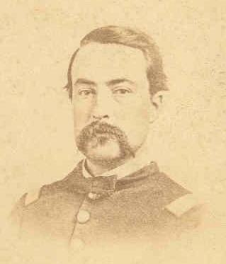 Ira W. Claflin, circa 1863